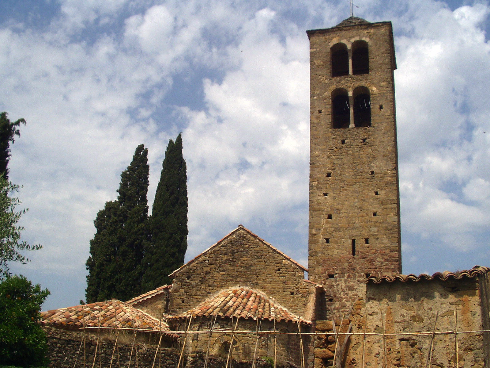 Esgésia de Sant Pere de Llorà